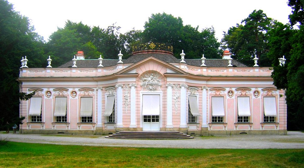 Amalienburg im Schlosspark Nymphenburg, Muenchen